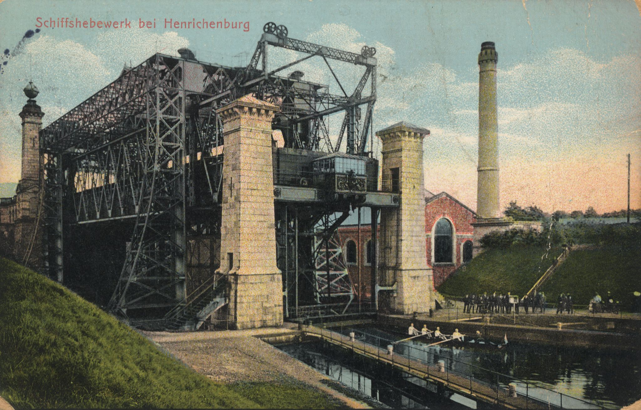 Altes Schiffshebewerk Henrichenburg